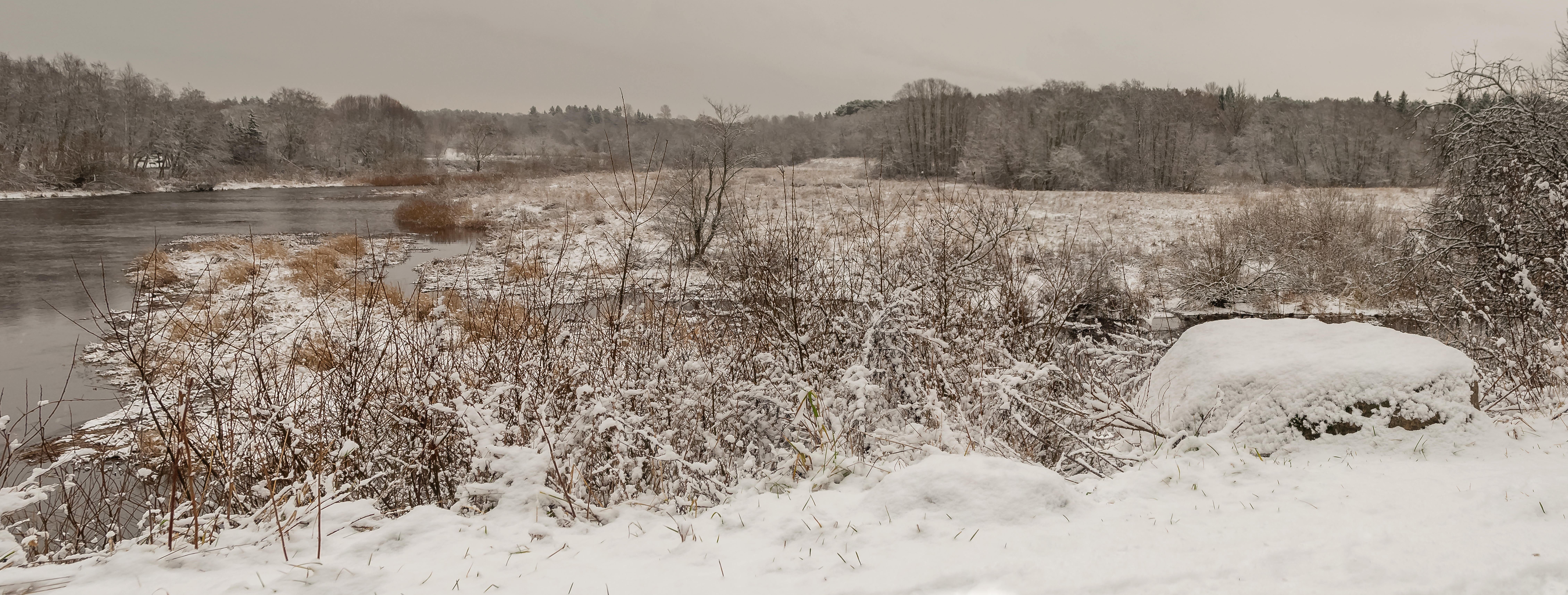 Pirita jõeoru maastikukaitseala. Pirita jõgi.